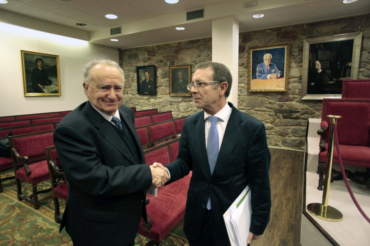 Alonso Montero e Manuel González, tras a votación na RAG na que foi elixido coma presidente da mesma Alonso Montero, en abril de 2013.